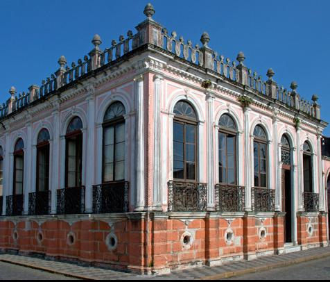 Ponto turístico Casa Elfrida Lobo em Paranaguá